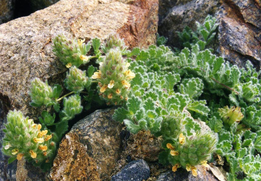 Teucrium compactum